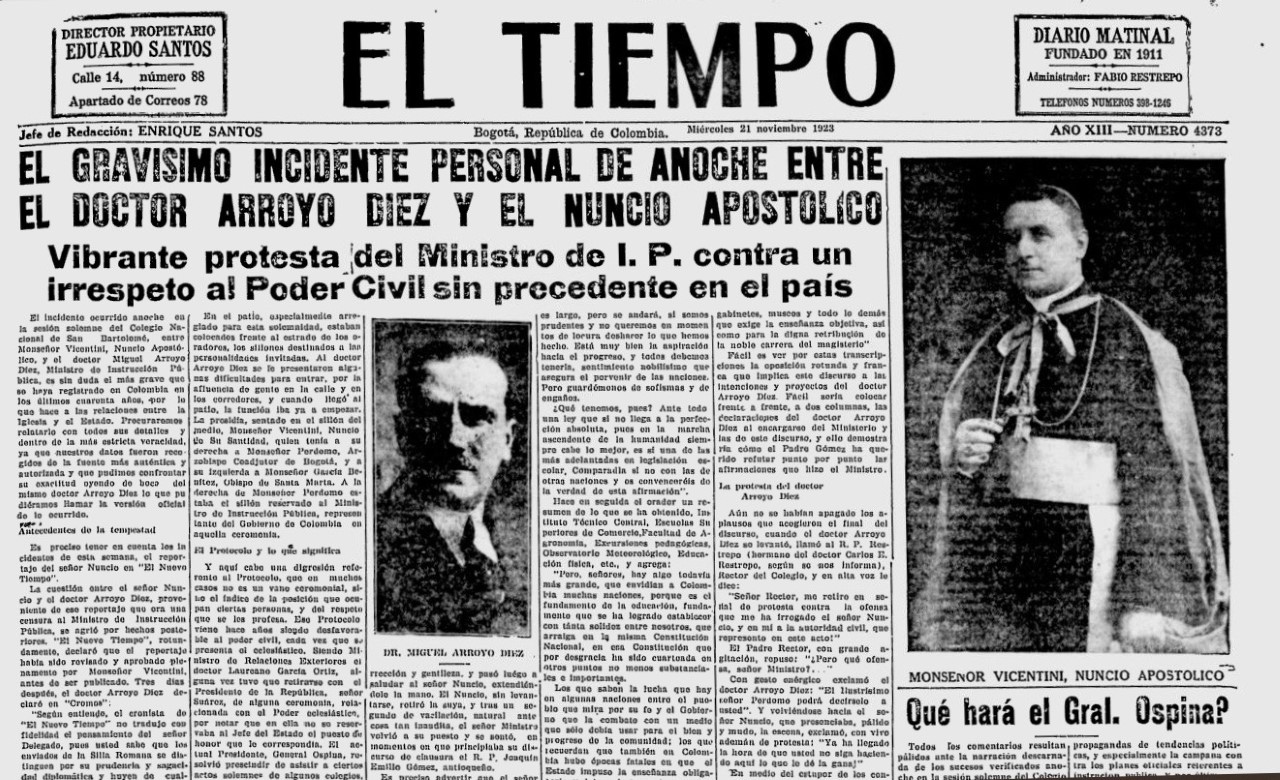 Incidente entre el nuncio y el Ministro de Educación de Colombia